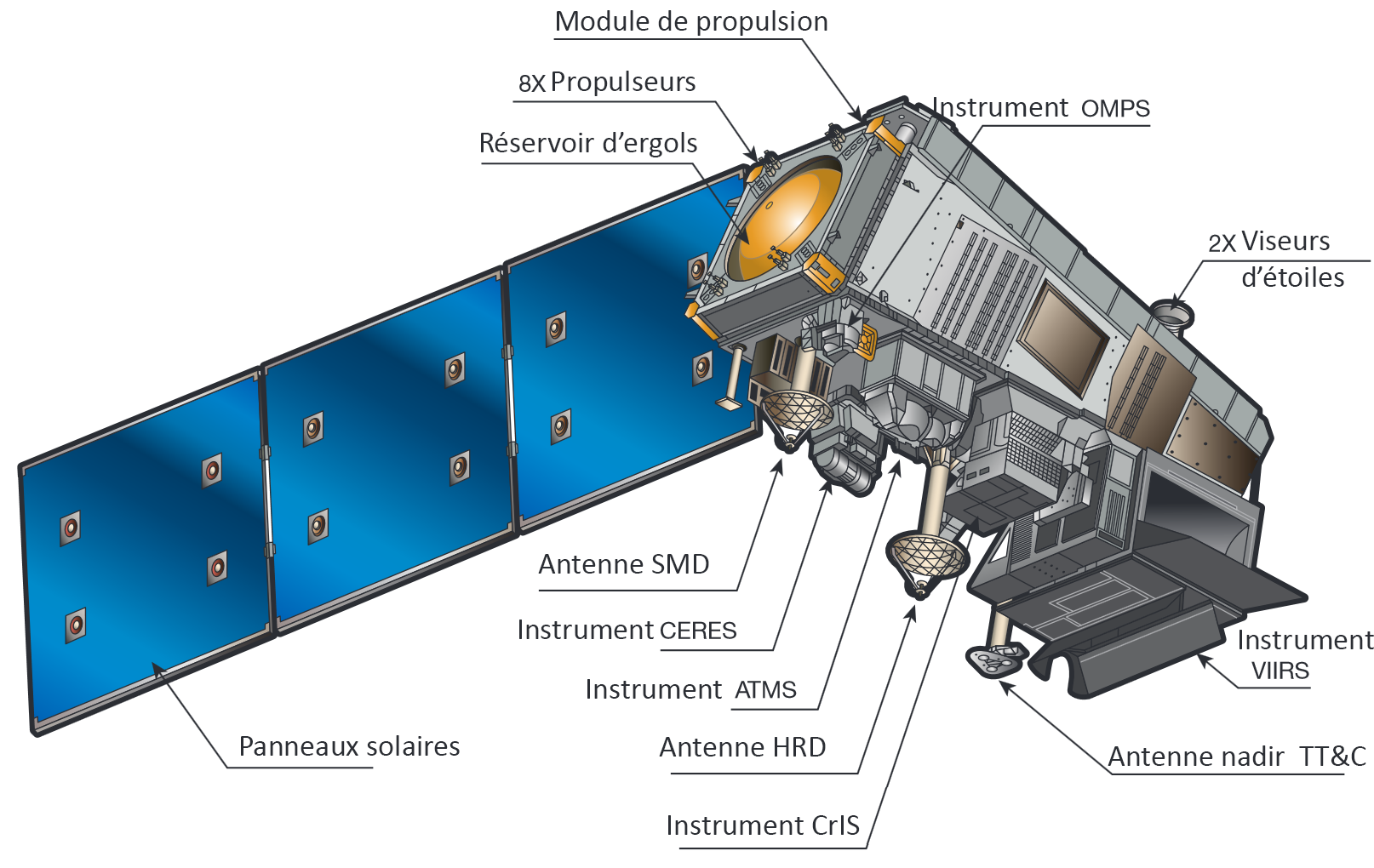 Schéma du satellite météorologique Suomi NPP. Version avec libellés en francais